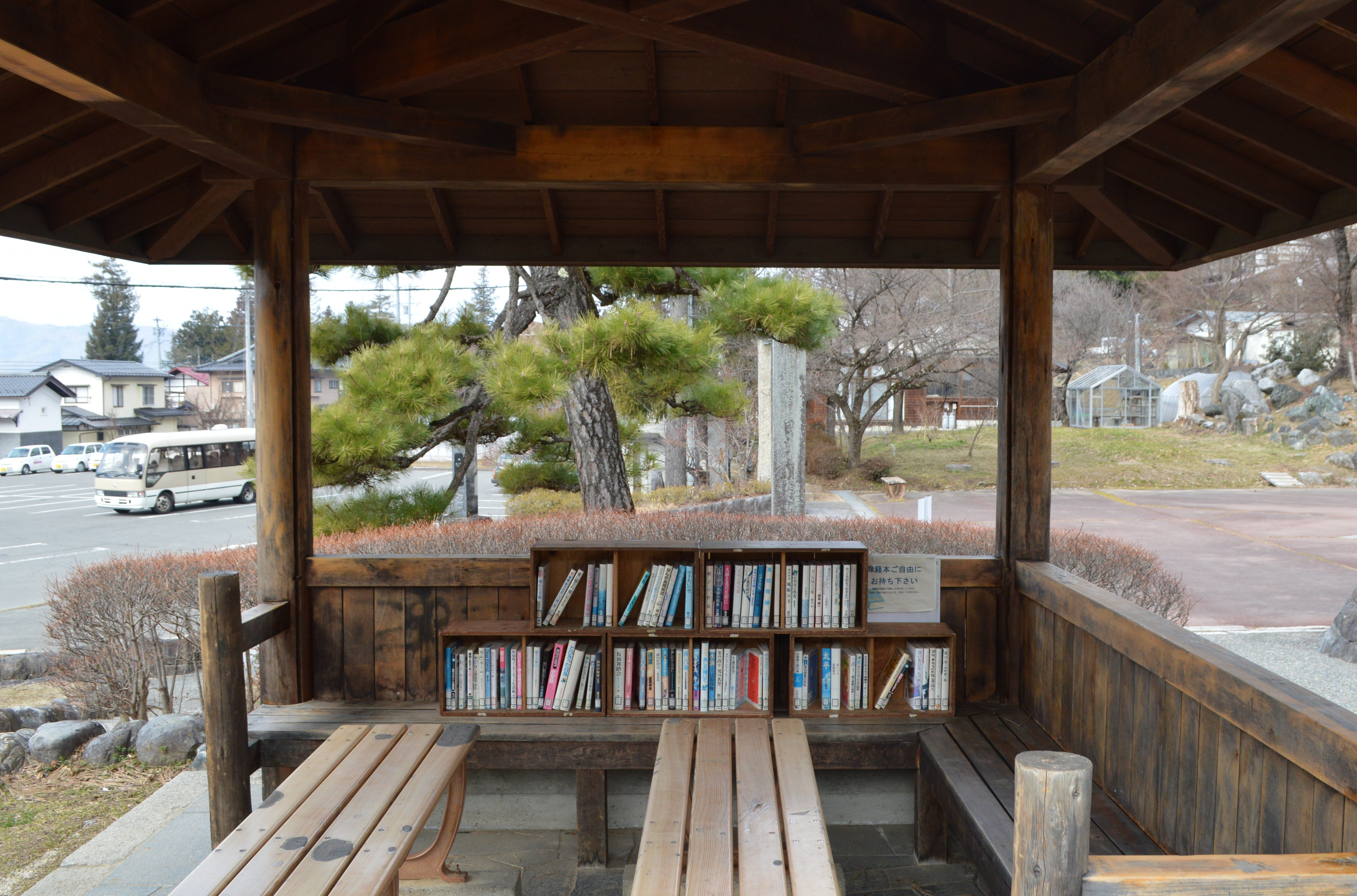 長野県伊那市、伊那市立高遠町図書館の館外にある東屋。書棚が置いてある。